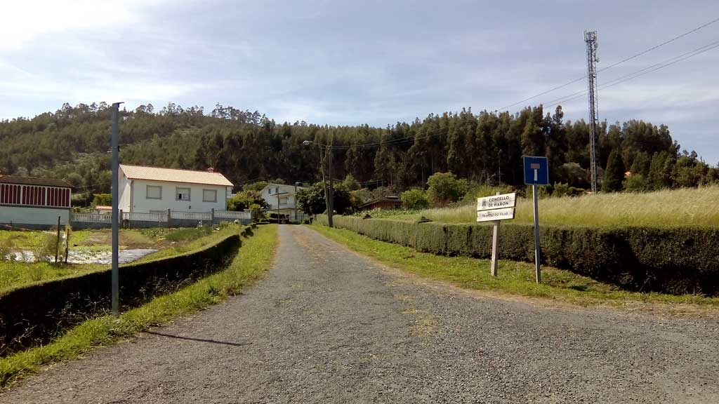 Imaxe da Calliqueira.